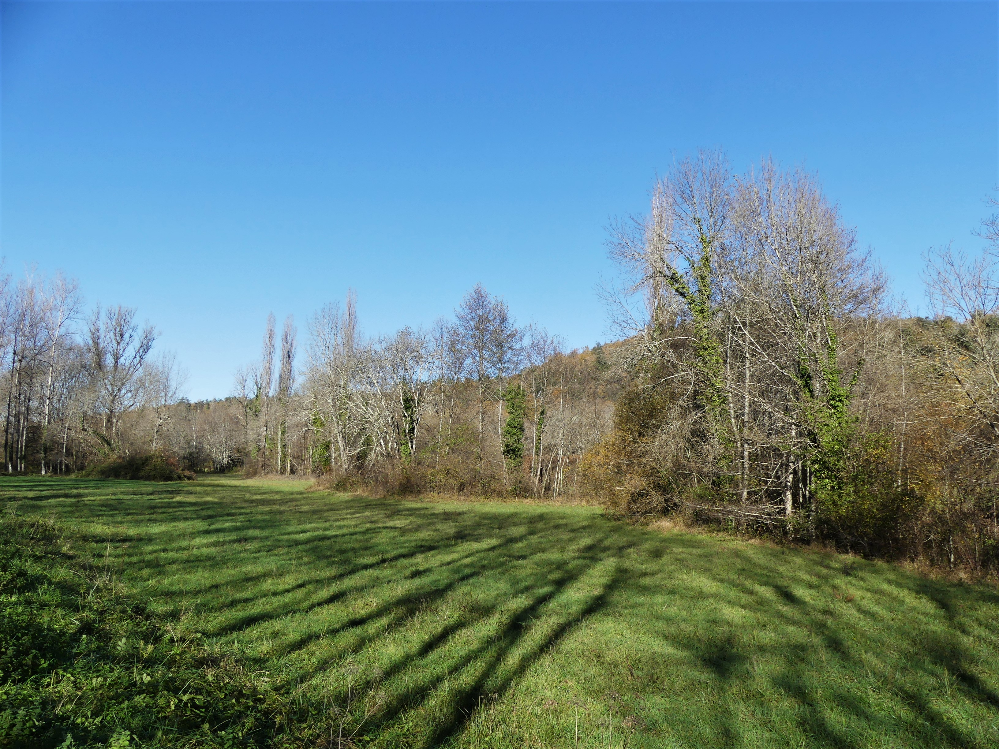 La vallée du ruisseau de Manaurie au lieu-dit Roucaudou, Manaurie, Dordogne, France.